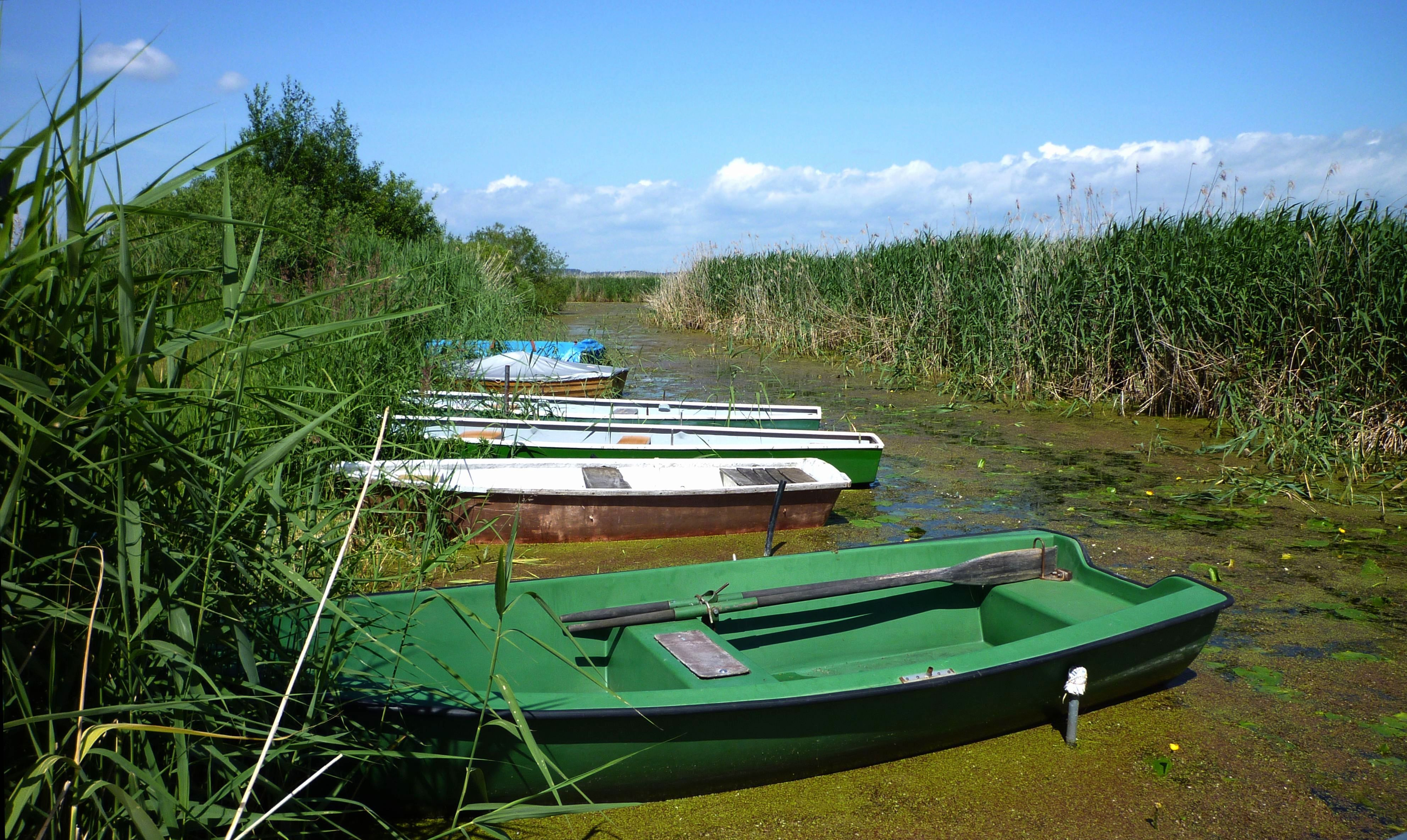 Tiefenbach – Boote mit Kanal zum Federsee, Naturschutzgebiet Federsee